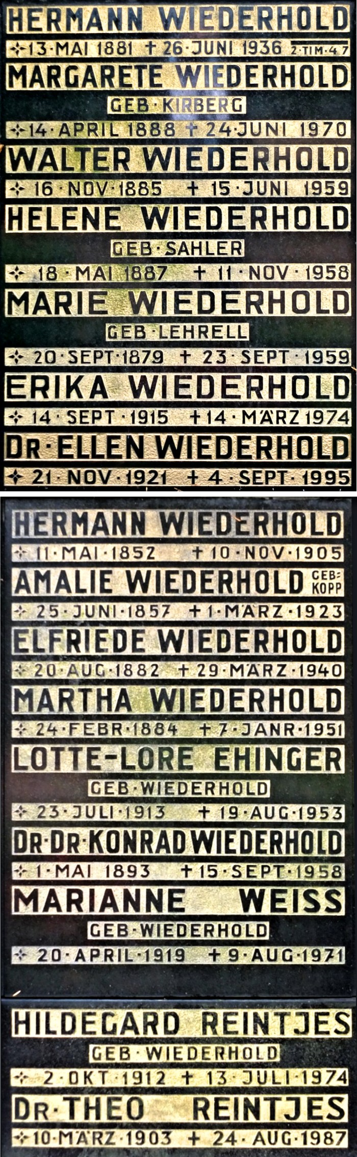 Grabmal der Industriellen-Familie Wiederhold (Lacke) auf dem Hauptfriedhof Hilden, Kirchhofstr.; Detail mit Daten beigesetzter Personen, u.a. Ehrenbürger Walter Wiederhold u. Ellen Wiederhold